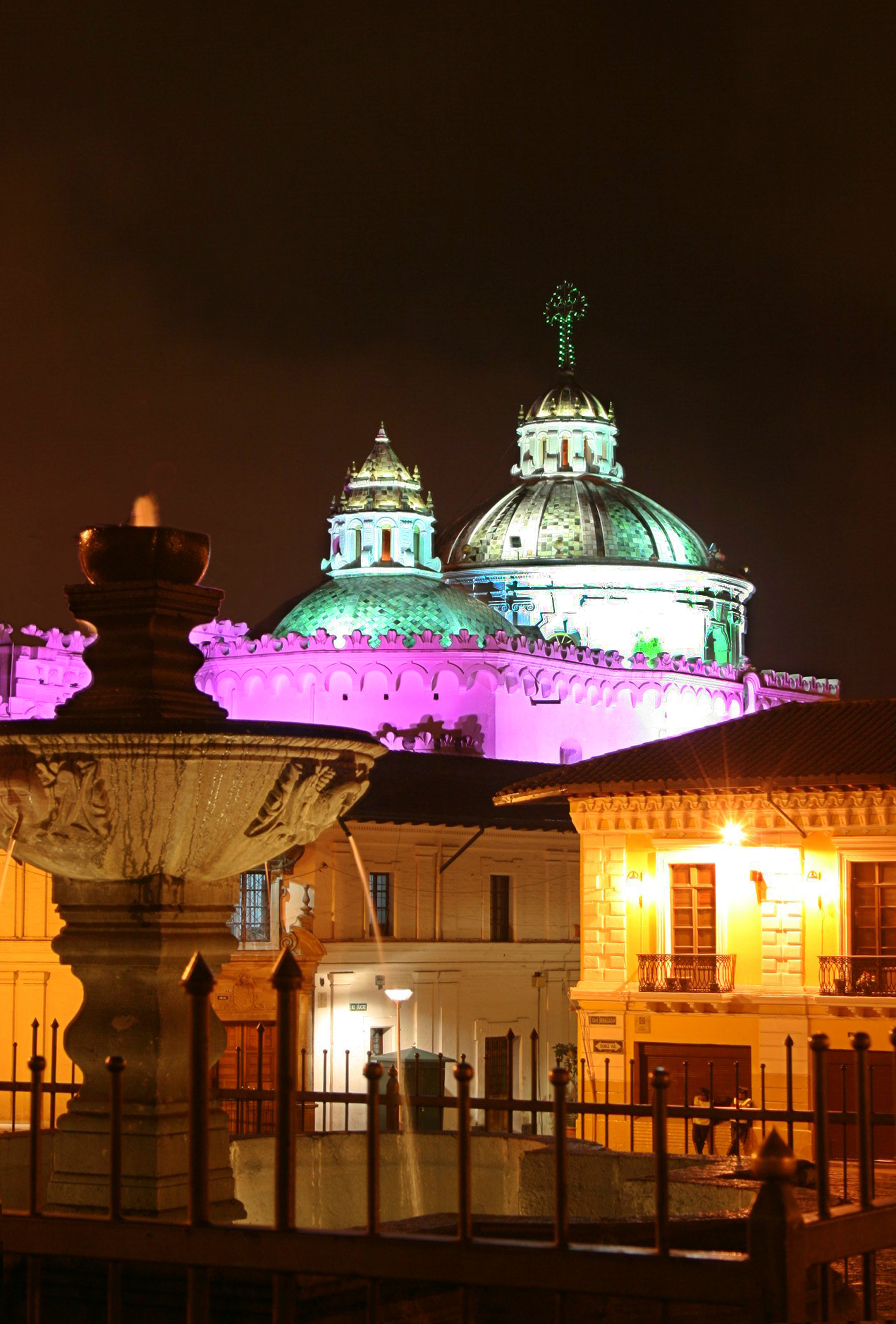 Centro Histórico de Quito, Cúpula de la Iglesia de la Compañía de Jesús